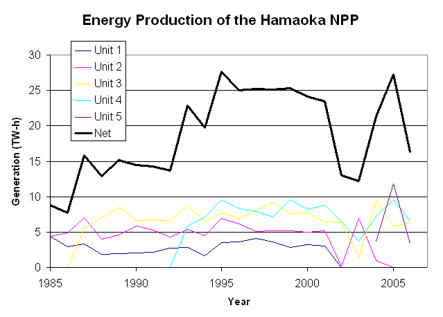 Stromproduktion des Kernkraftwerks Hamaoka seit der Inbetriebnahme.